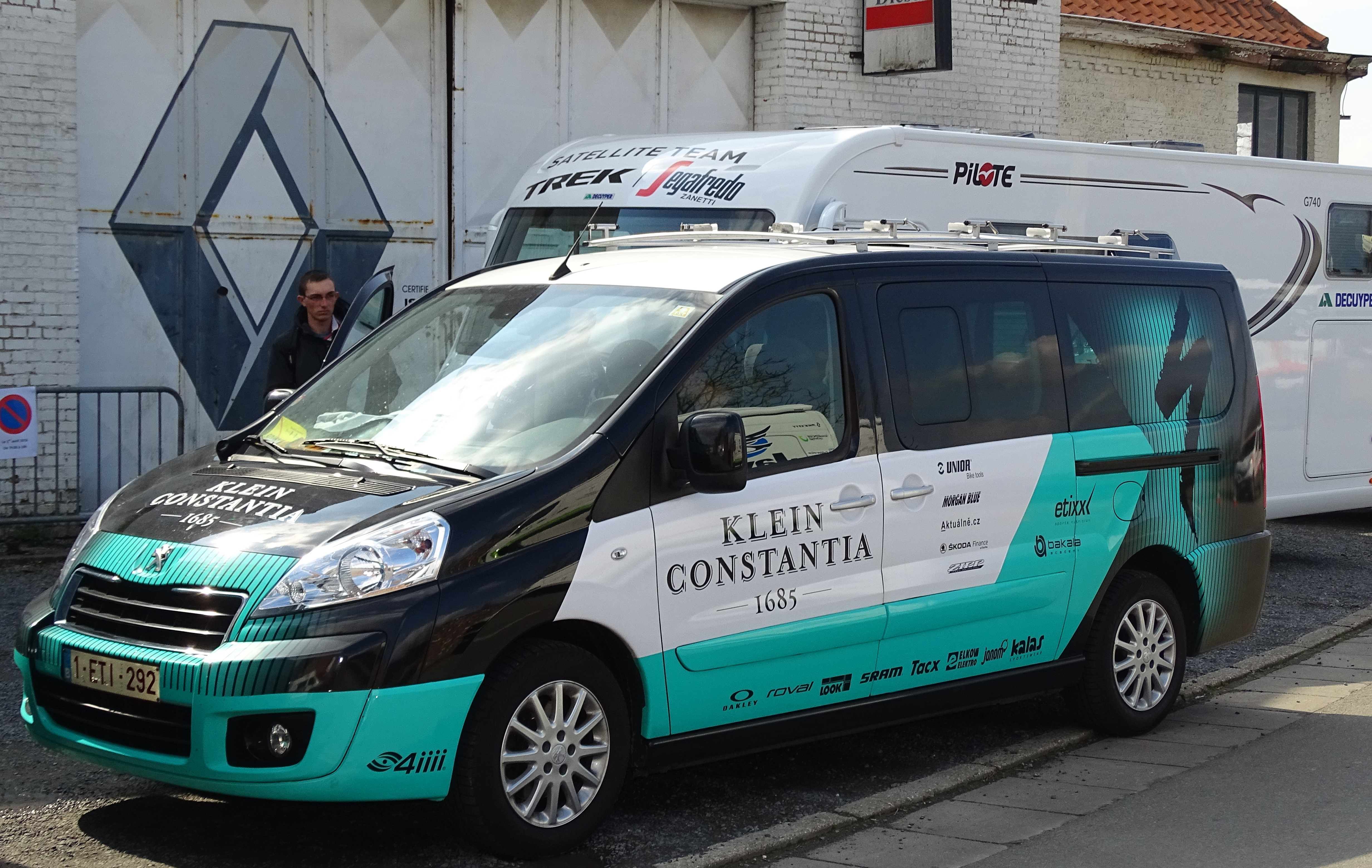 Triptyque des Monts et Châteaux 2016